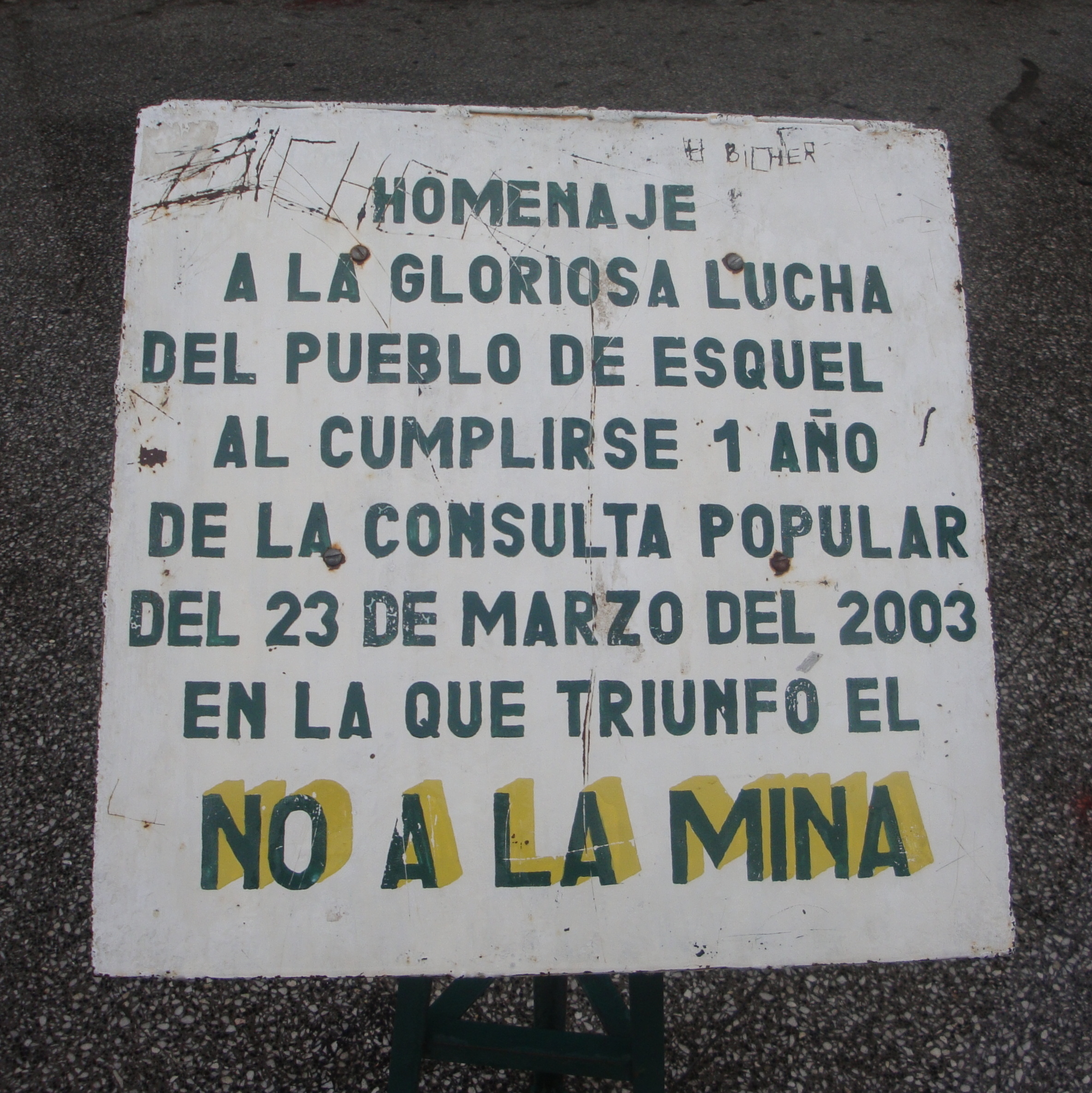 Placa recordatoria a la consulta popular celebrada en la ciudad de Esquel en 2003, donde triunfó la opción contraria a la explotación minera.